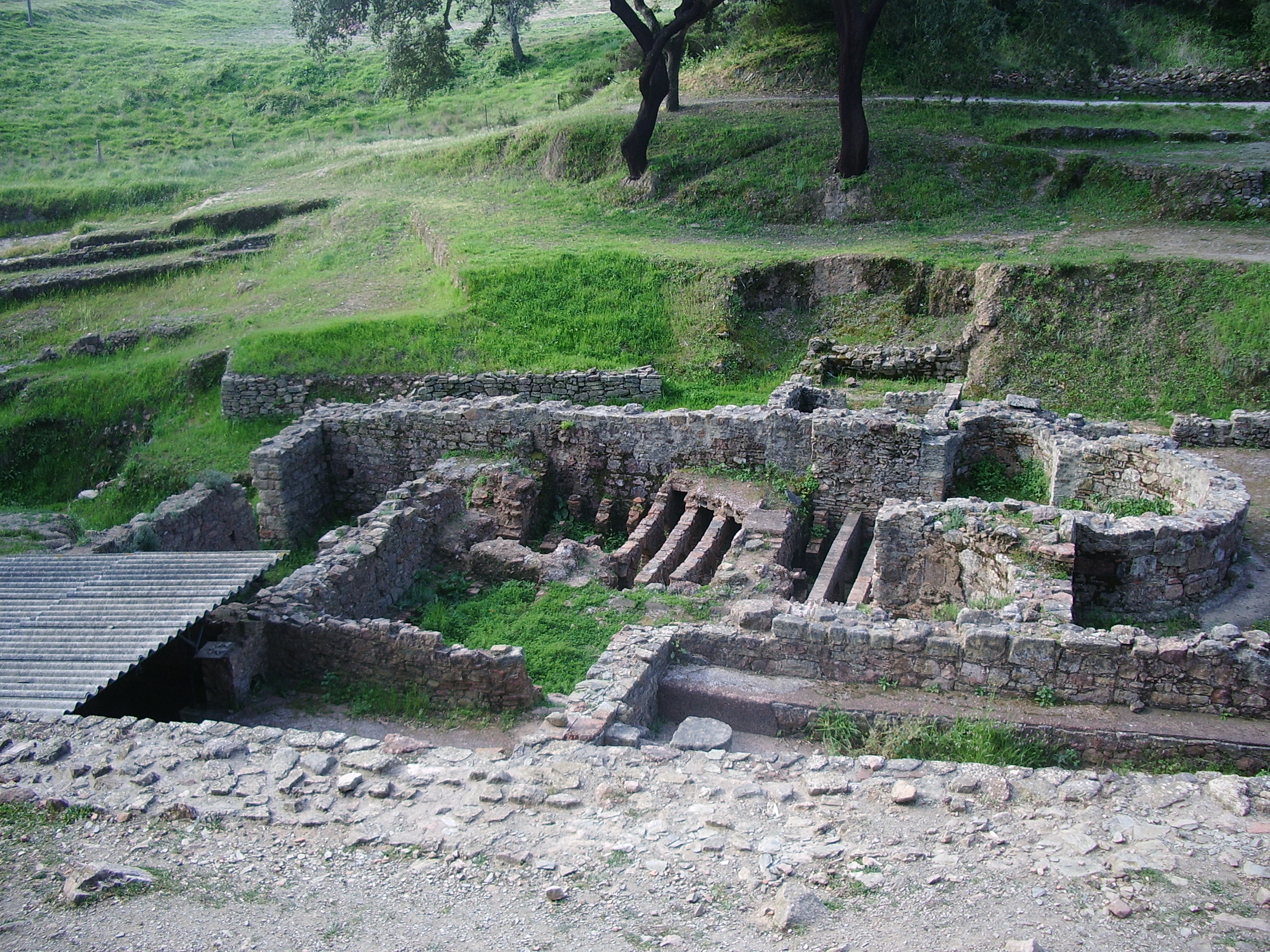 En Teil der Thermenanlage